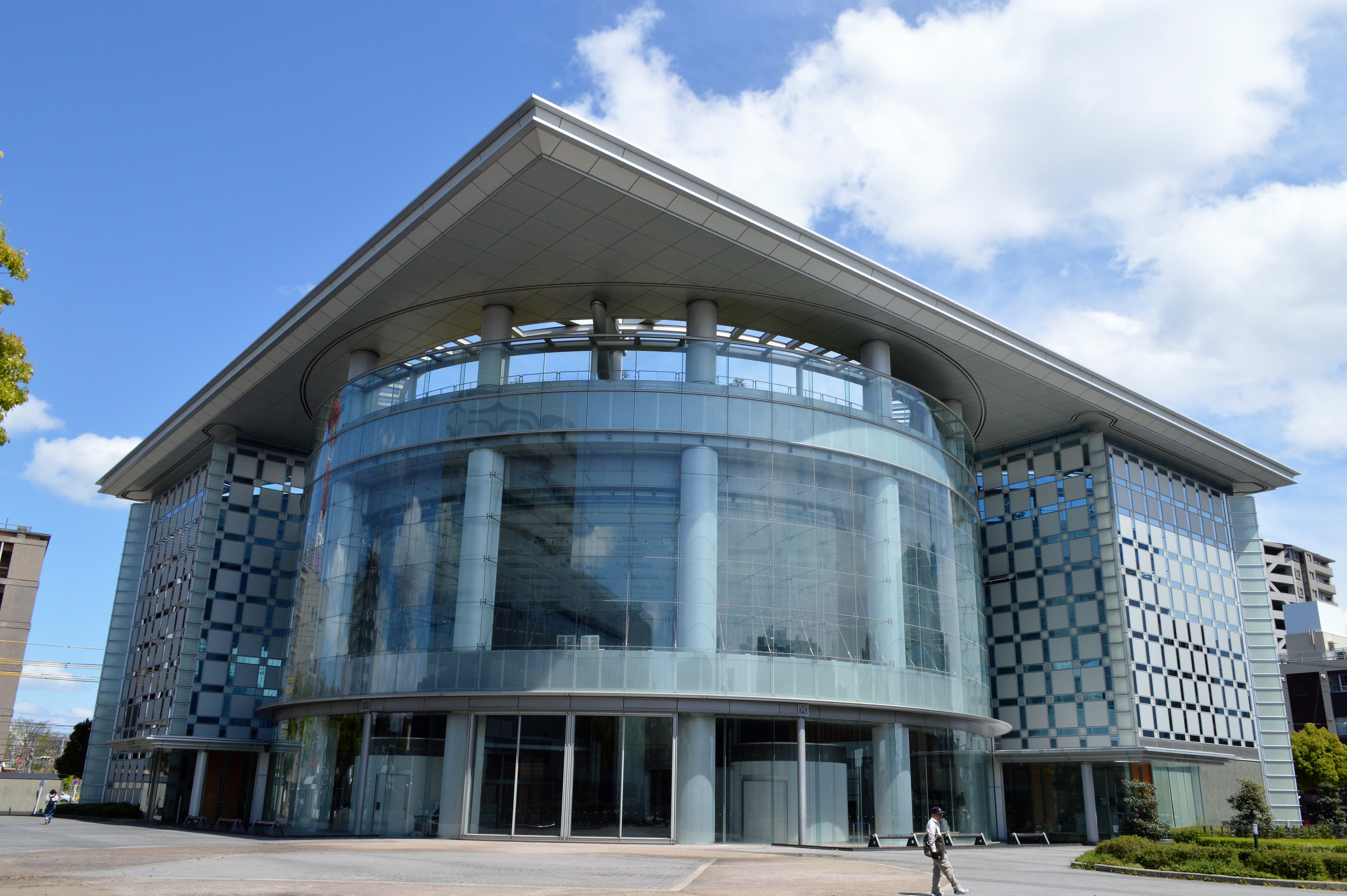 愛知県春日井市の文化フォーラム春日井。